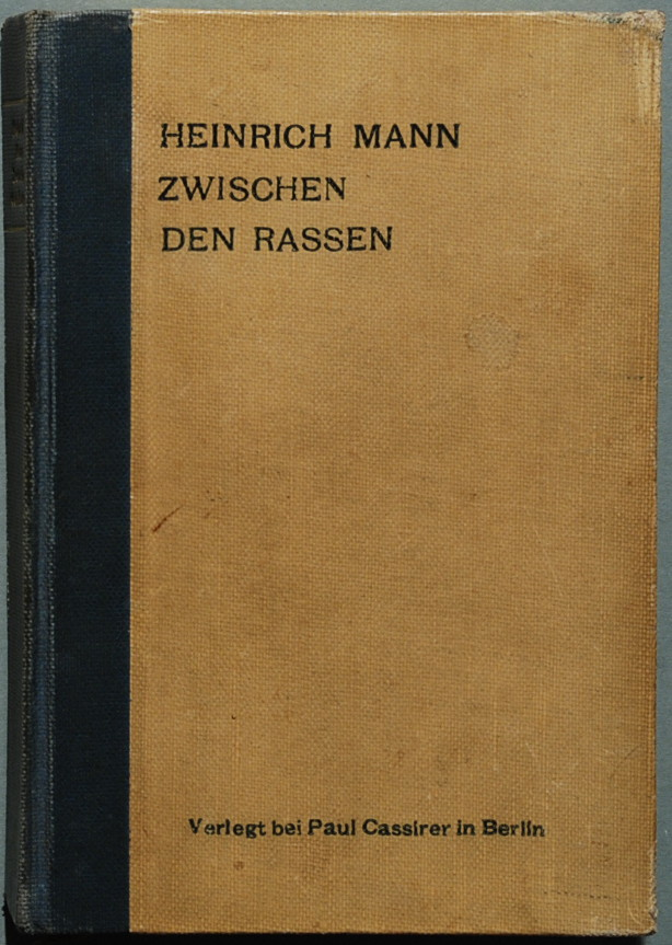 Mann, Heinrich: Zwischen den Rassen. Roman. München: P. Cassirer 1907, 576 Seiten. 1.Auflage; Original-Halbleinen des Verlages Paul Cassirer, Berlin, der die Auflage vom Verlag A. Langen übernommen hatte.